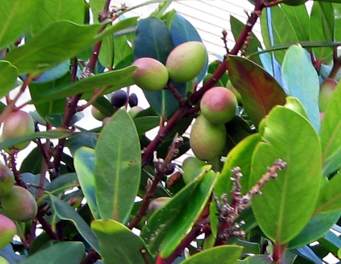 Persea indica (fruits) photographié à La Palma